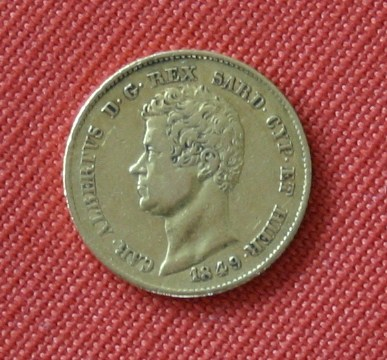 20 Lire Goldmünze von Karl Albert Sardinien Piemont aus 1849 geprägt in Genua